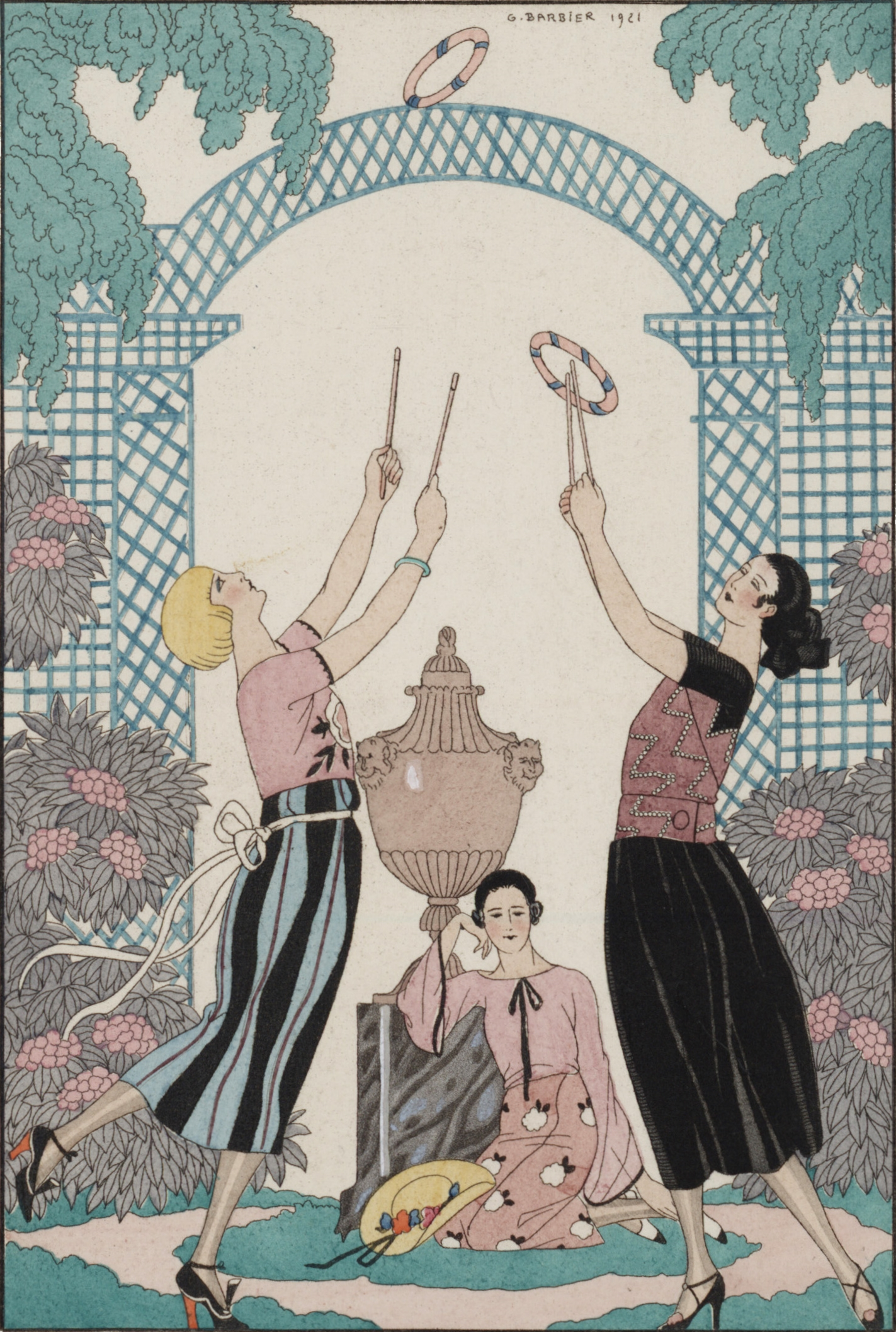 George Barbier, Le Jeu des Grâces, illustration de Falbalas & fanfreluches : almanach des modes présentes, passées & futures pour 1922